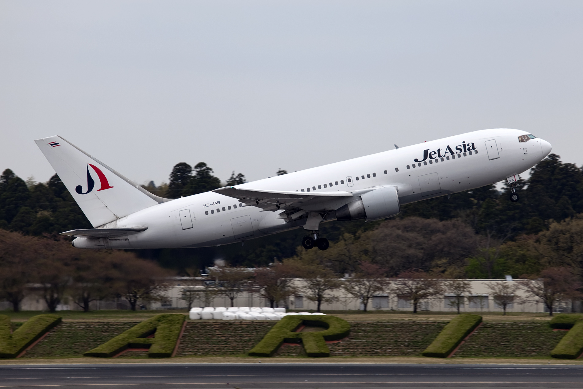 Tokio-Narita